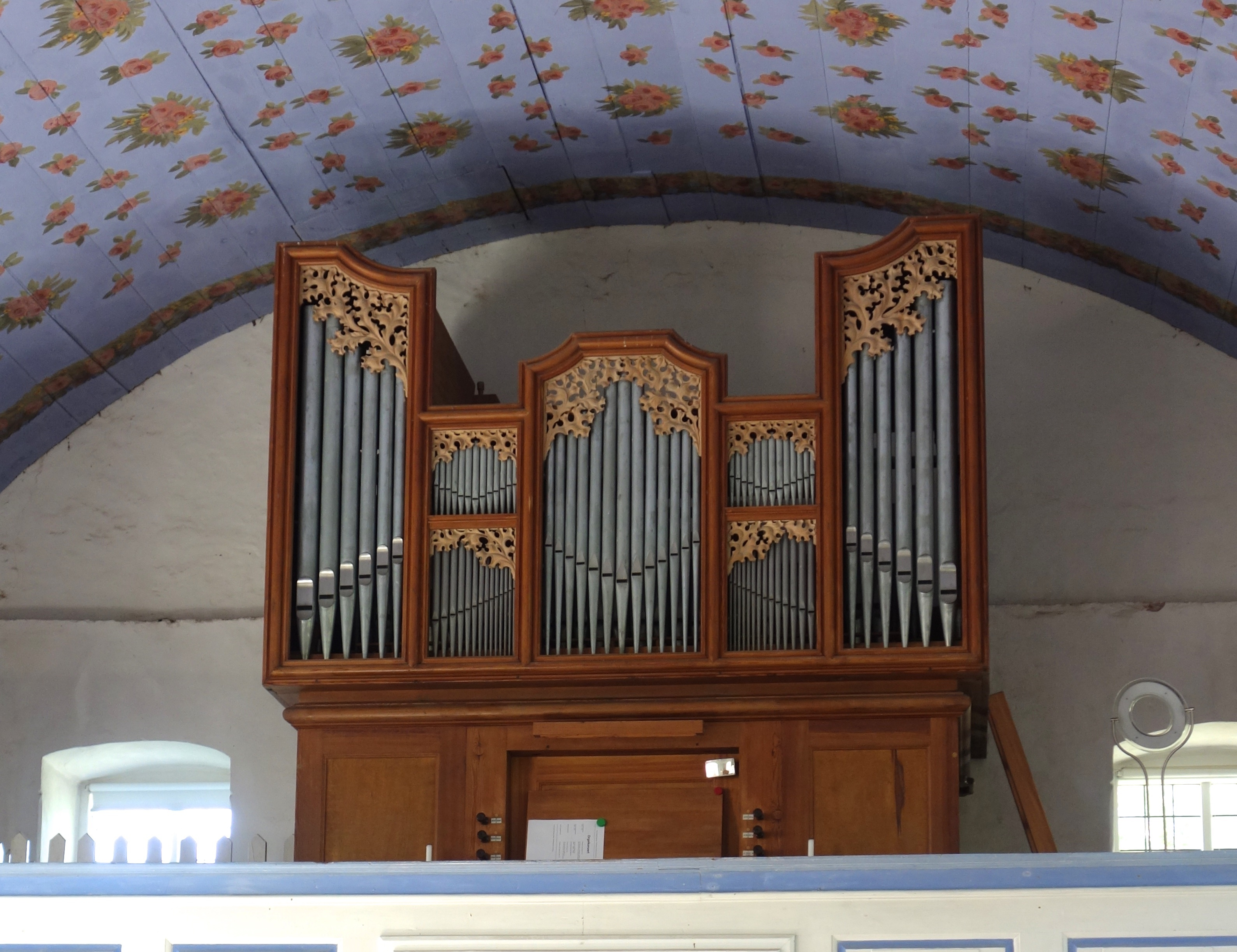 Inselkirche Hiddensee: Schuke-Orgel von 1943